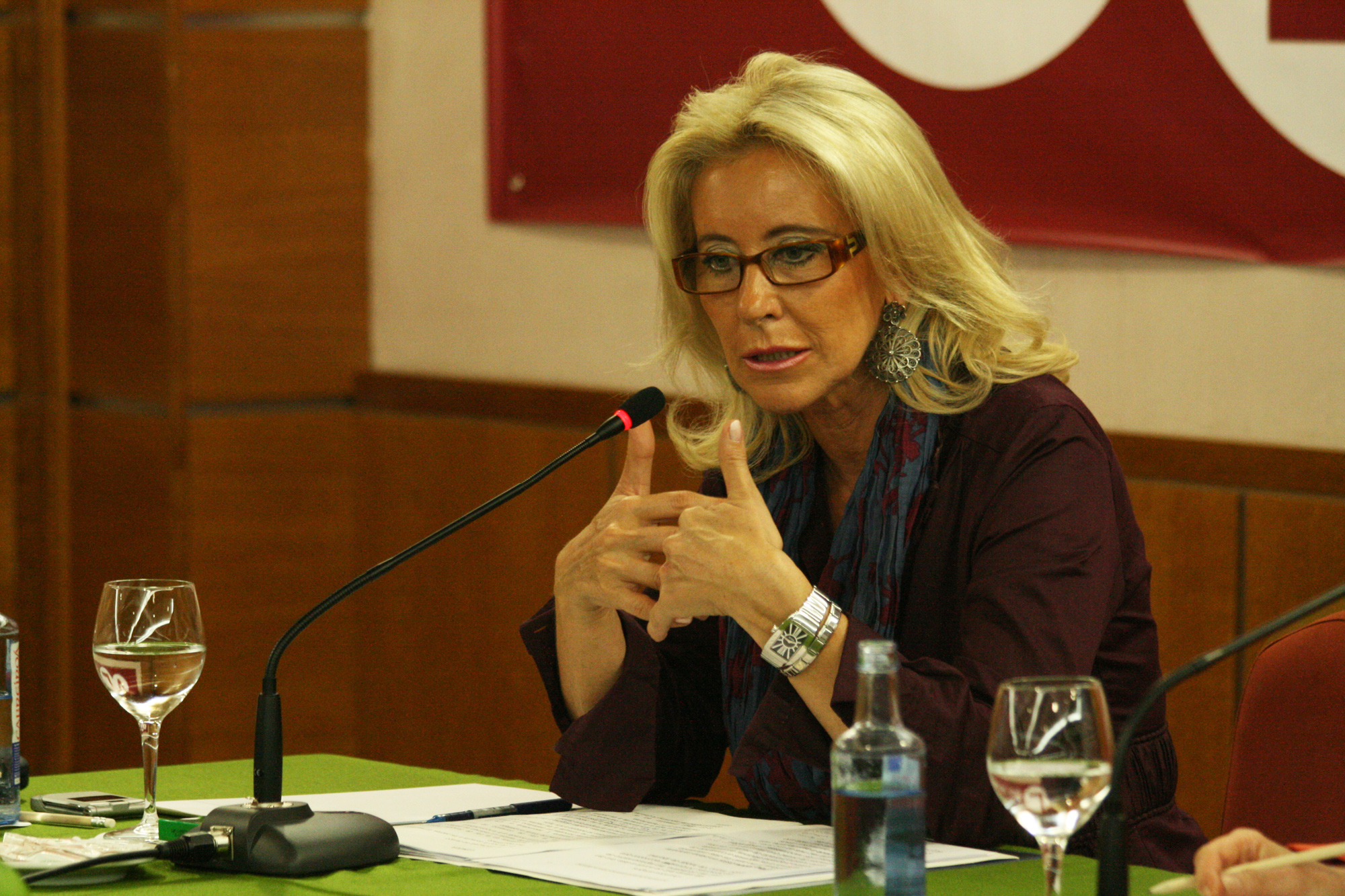 Coloquio con Corina Porro, candidata a la alcaldía de Vigo por el Partido Popular. El evento fue organizado por la asociación cívica Vigueses por la Libertad, con motivo de las elecciones municipales que se celebran en España. Discussion with Corina Porro Discussion with Corina Porro, a candidate for mayor of Vigo for the Partido Popular (Peoples Party). The event was organized by the civic association Vigueses por la Libertad (Vigueses for Freedom), during the municipal elections held in Spain.